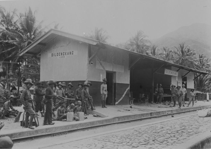 foto. Militairen van hetr KNIL met gevangenen op het spoorwegstation van Siloengkang tijdens de onderdrukking van de opstand